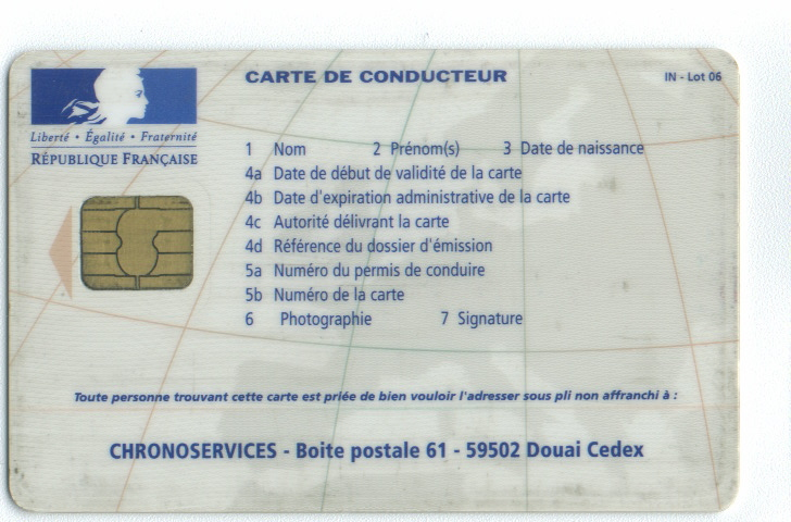 Verso carte de conducteur (chrono numérique).